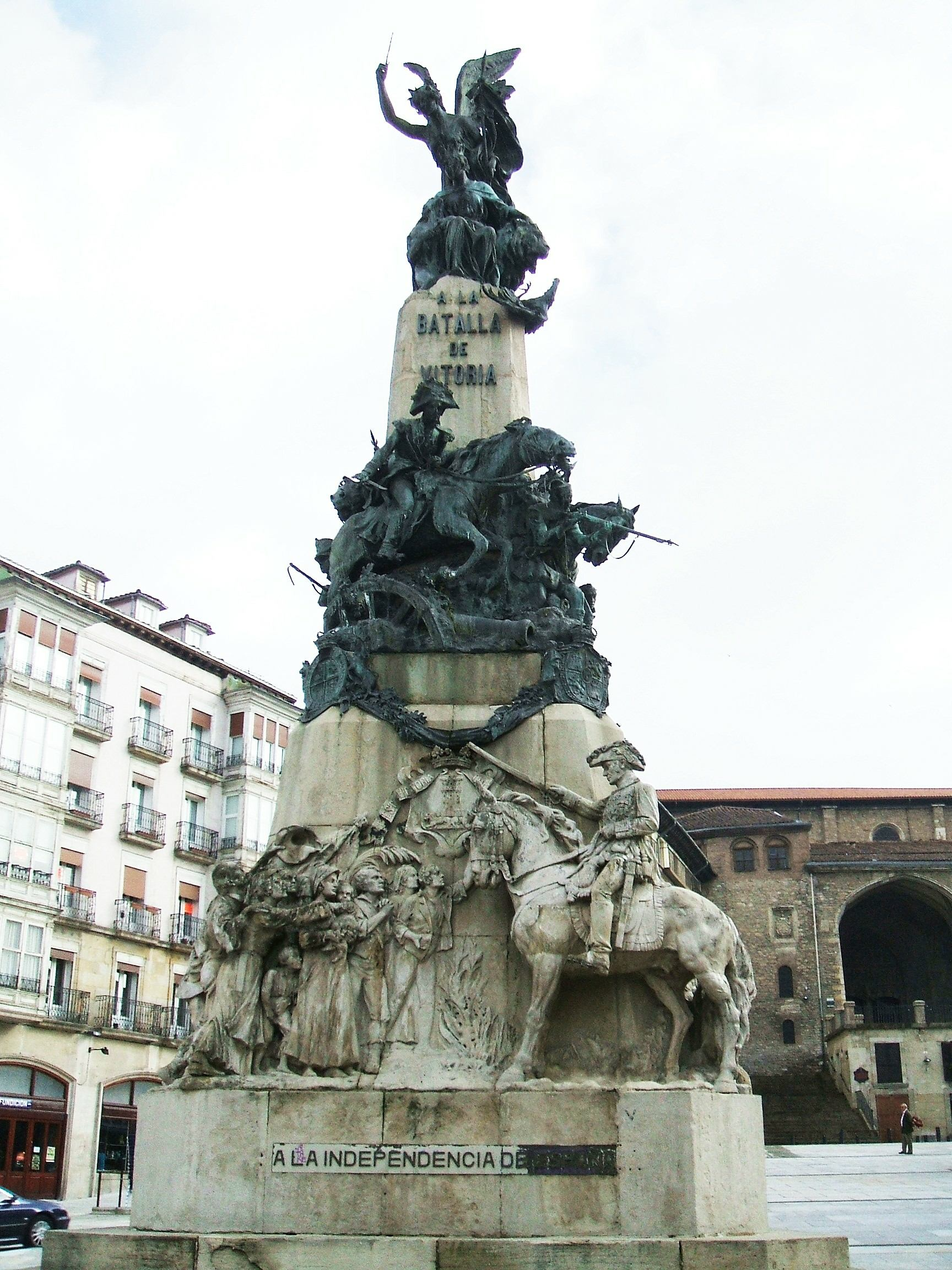 Monumento a la Batalla de Vitoria (1813), en la Plaza de la Virgen Blanca de Vitoria-Gasteiz, País Vasco, España